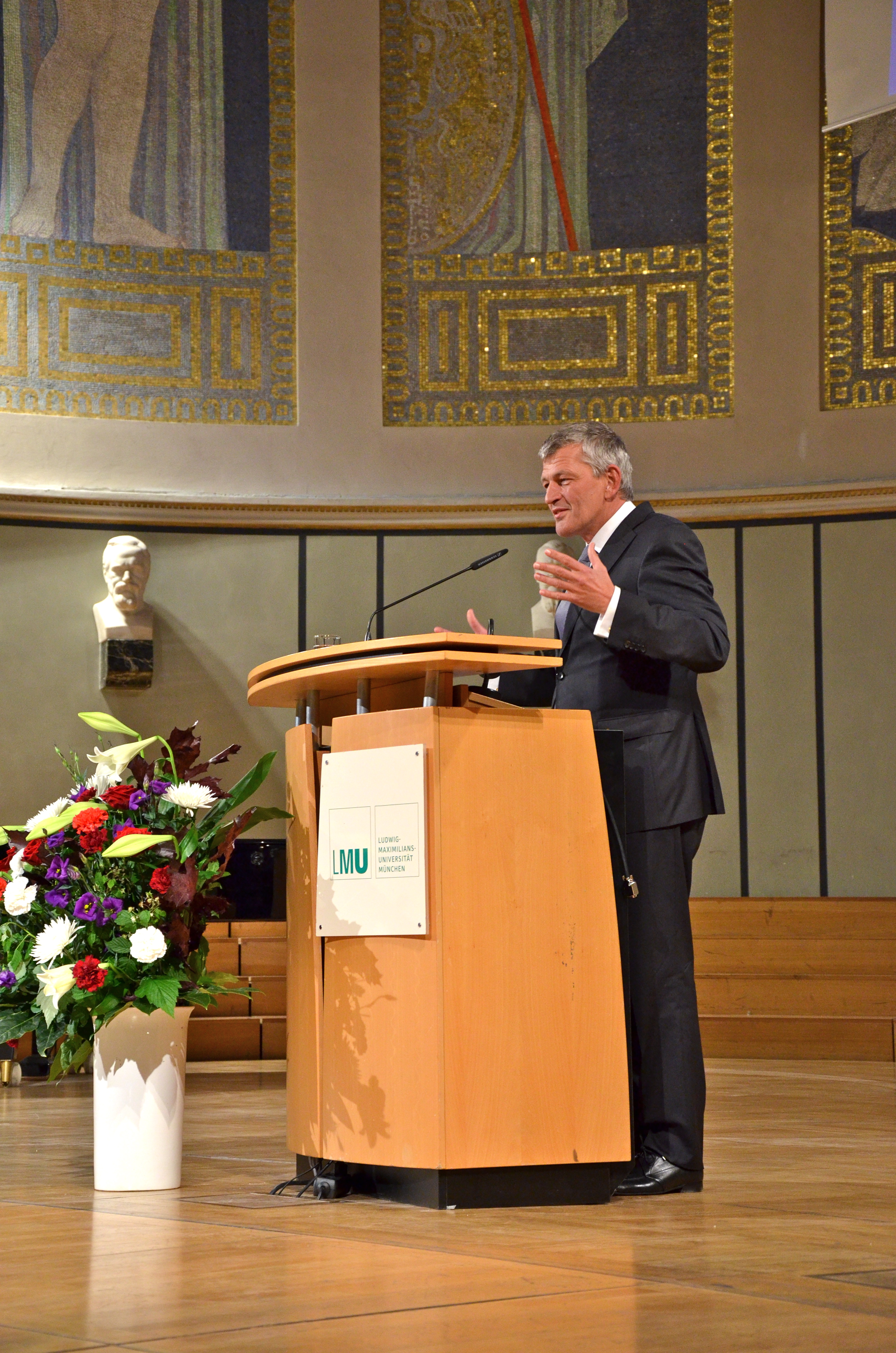 LMU-Präsident Prof. Bernd Huber